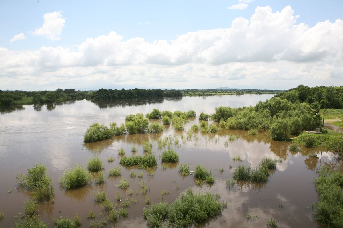 уссури